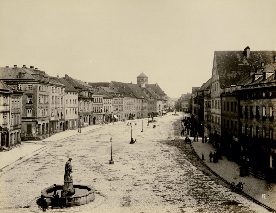 Bayreuth, Maximilianstraße, 1891, albumen print, c. 20 x 26 cm